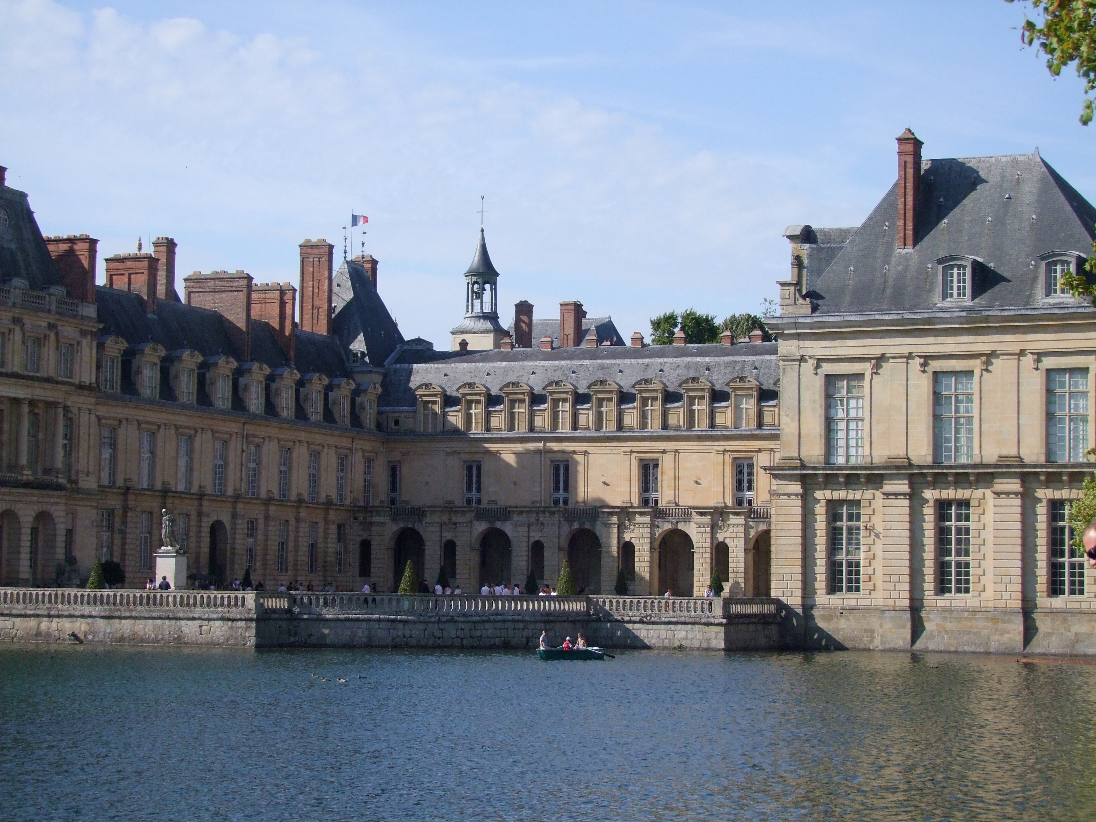 Château de Fontainebleau, Seine-et-Marne, France .